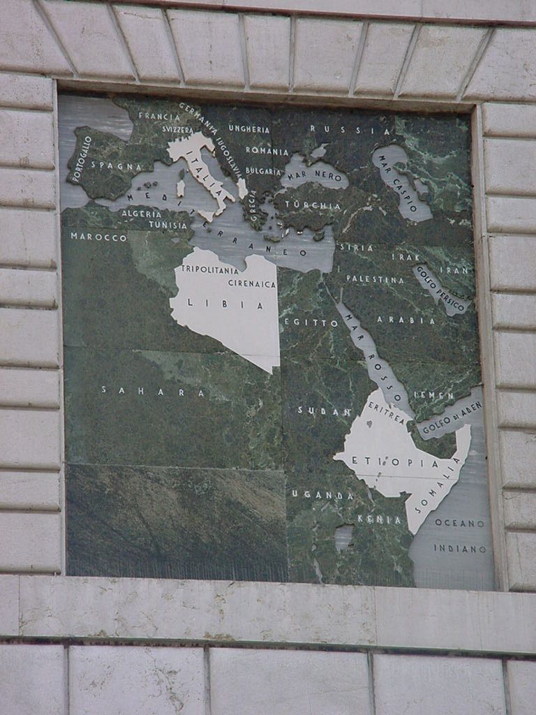 Autore Utente:DracoRoboter Mappa impero coloniale italiano piazza delle erbe (Padova) Targa su un palazzo